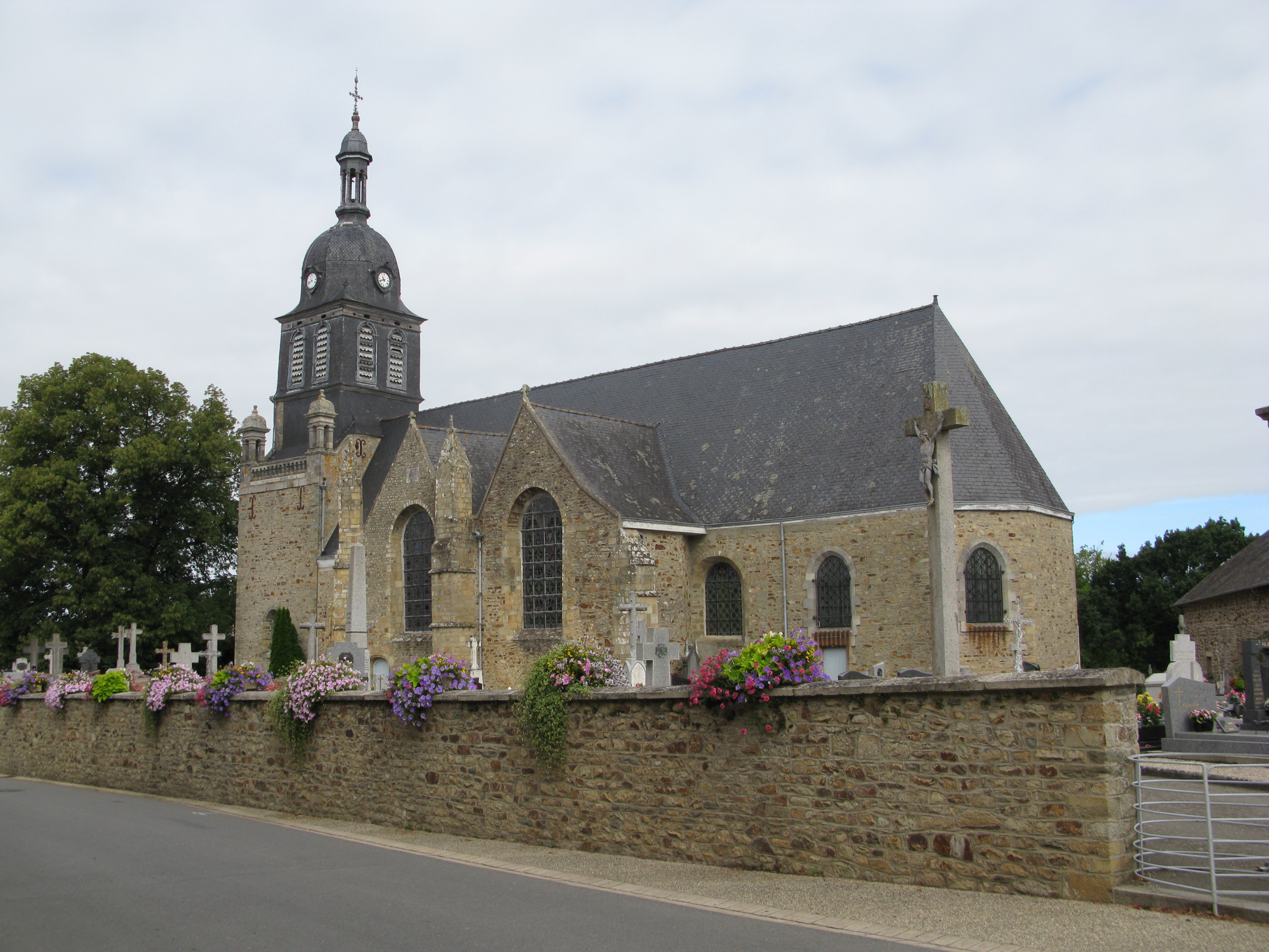 Église Saint-Pierre d'Availles-sur-Seiche